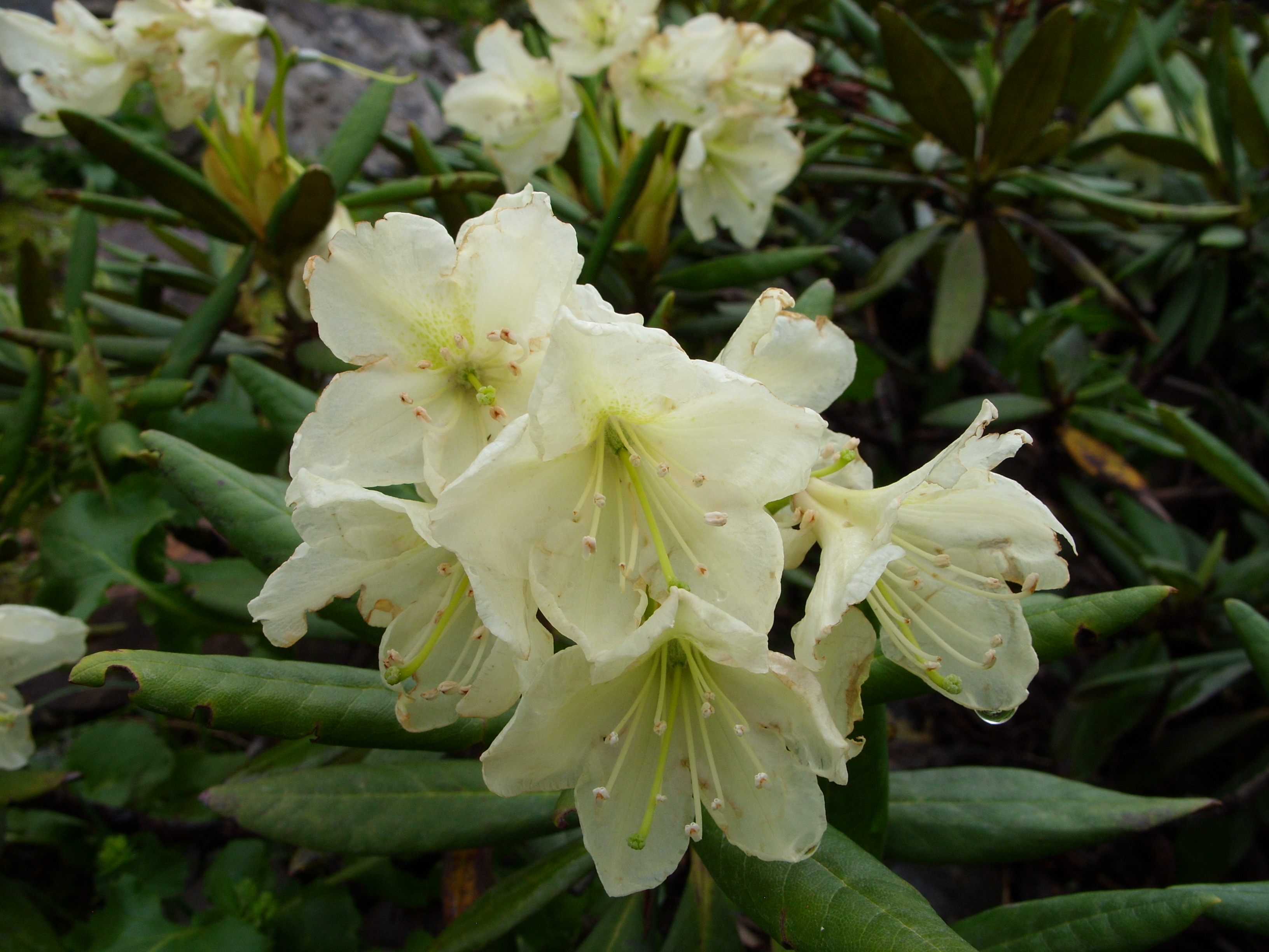 Снимки сделаны во время автобусной экскурсии из Железноводска, июль 2009 г.